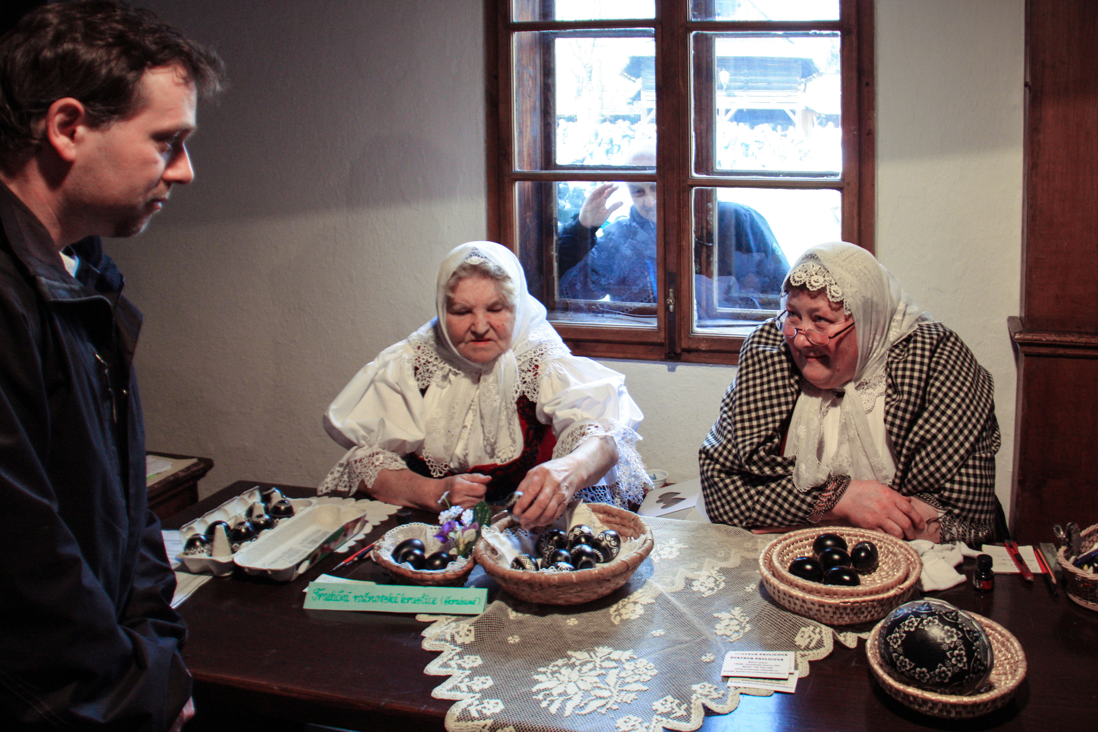 Rozmowa na temat tradycyjnych pisanek z Wołoszczyzny (kraslic z Valašska). Zdjęcie zrobione w 2017 roku podczas jarmarku wielkanocnego w Valašské muzeum v přírodě – skansen na Morawskiej Wołoszczyźnie znajdujący się w mieście Rožnov pod Radhoštěm.